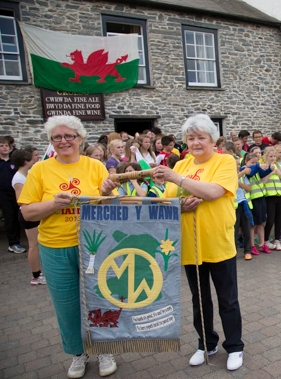 Aelodau o Ferched y Wawr gyda Ras yr Iaith 2014 wrth iddi fynd drwy Dregaron